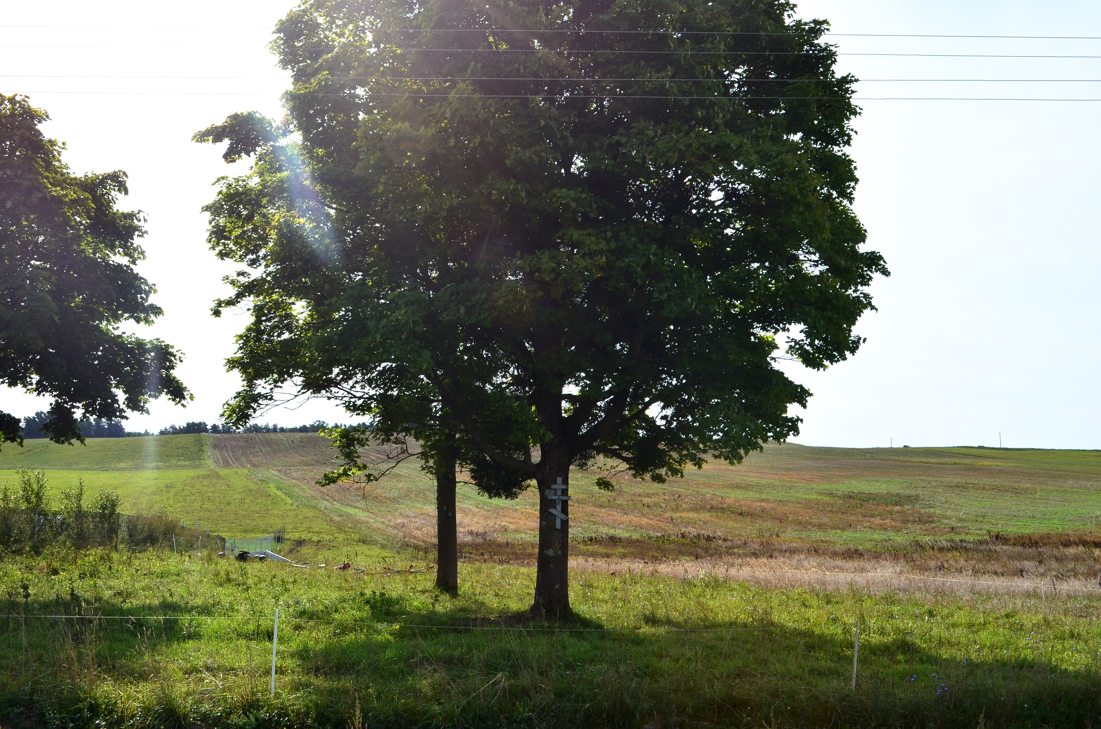 Patelviškys, Prienų raj.